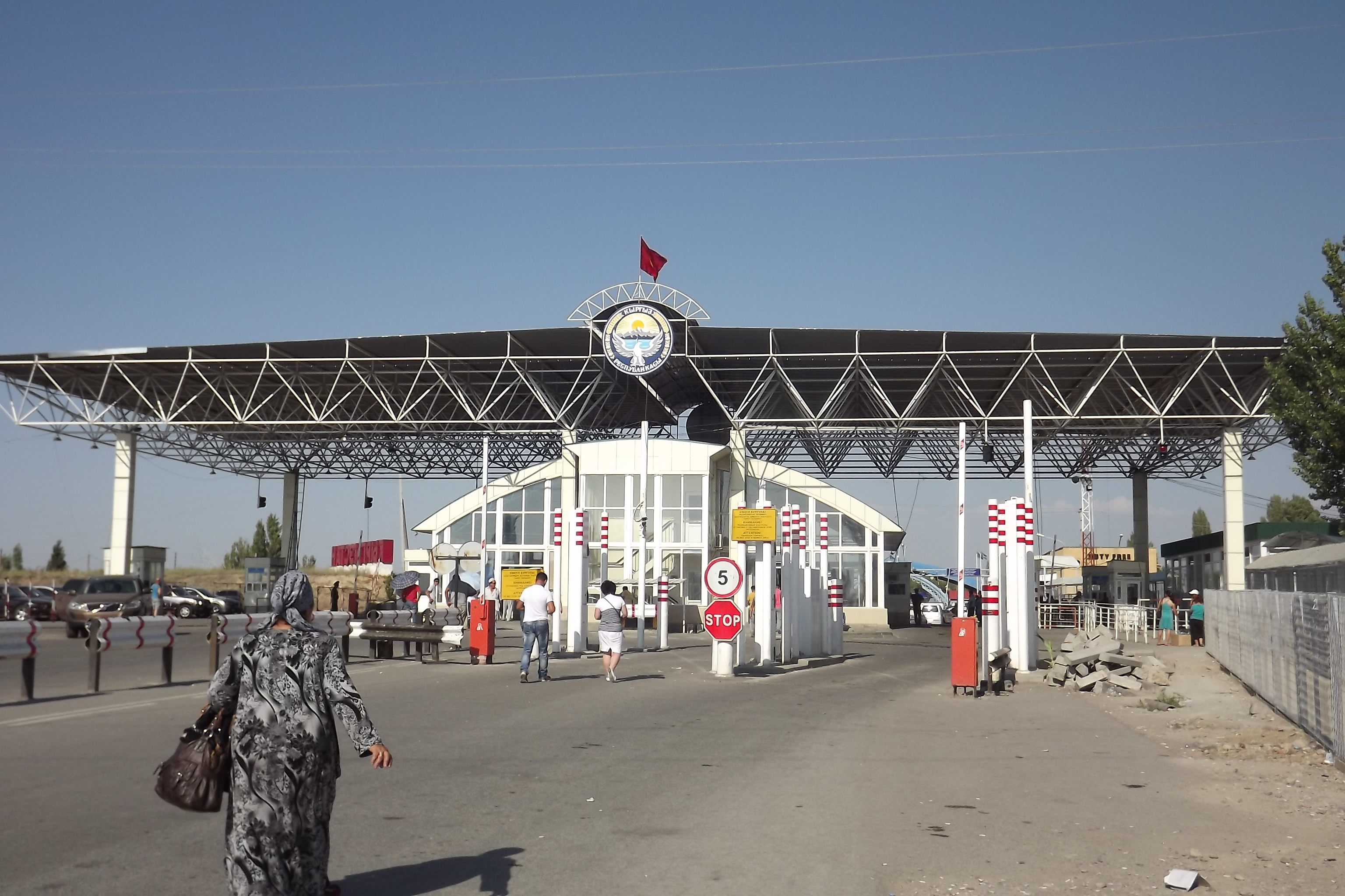 Пограничный переход в Кыргызстане на границе с Казахстаном